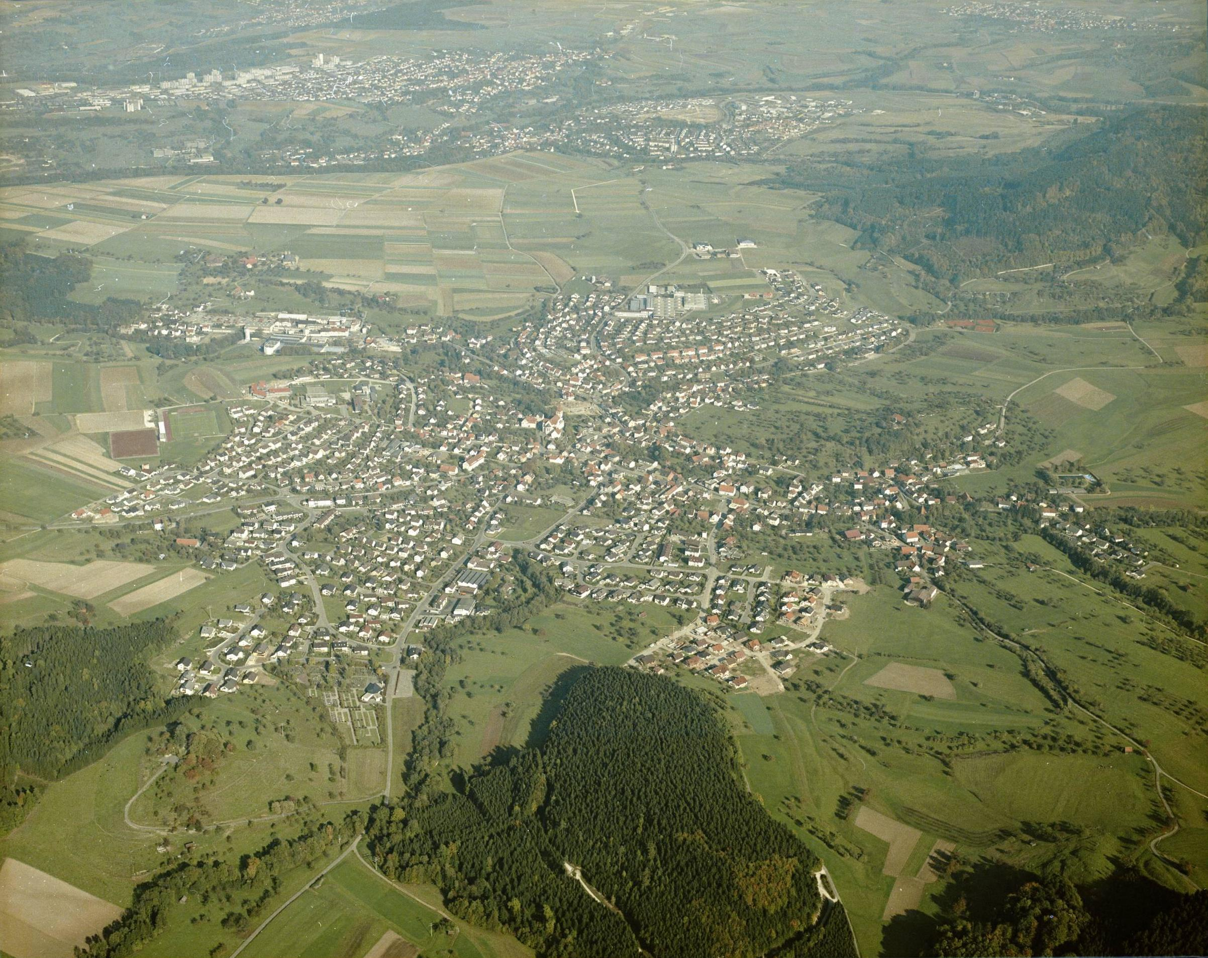 Luftbild von Waldstetten - Staatsarchiv Sigmaringen - Archivalieneinheit N 1/96 T 1 Nr. 584